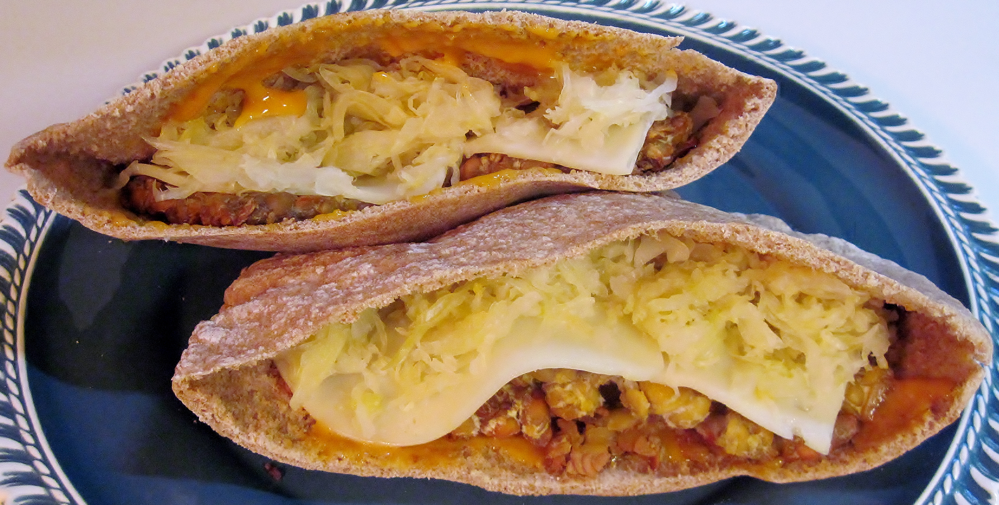 Tempeh reuben pita sandwich, recipe